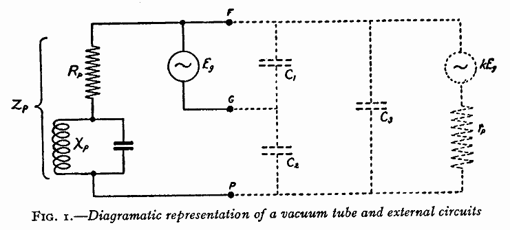 Ersatzschaltung zum Miller Effekt